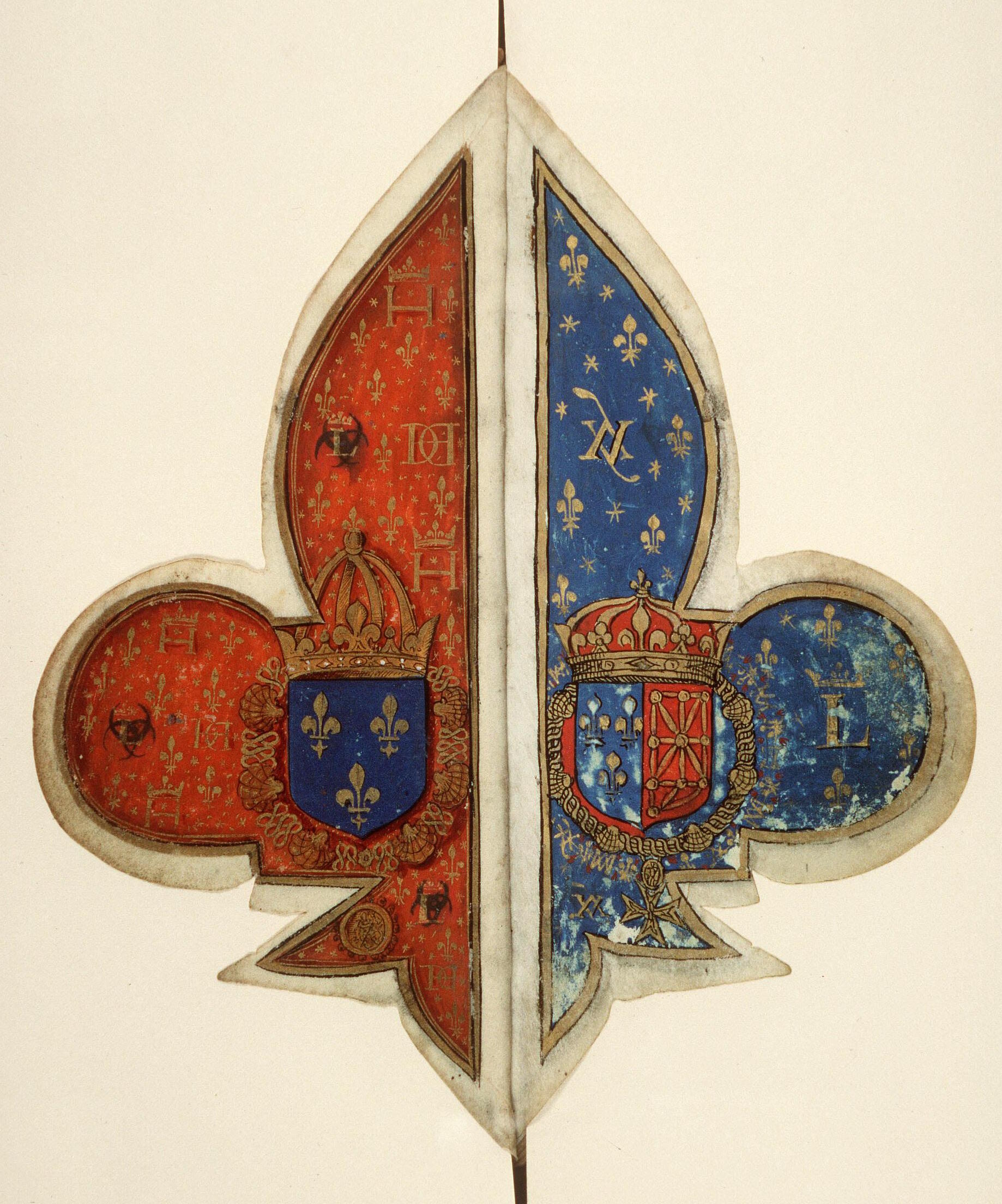 folio 000Iv-001 du Manuscrit en forme de Lys : Armes d'Henri II/Armes ajoutées de Louis XIII - Bibliothèques d'Amiens Métropole (fonds Lescalopier, Ms.22)